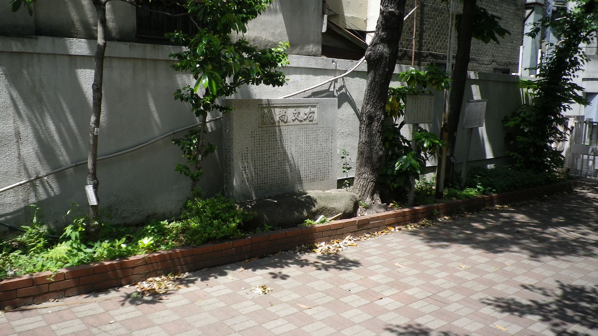 千葉周作の玄武館跡/東條一堂の瑶池塾跡